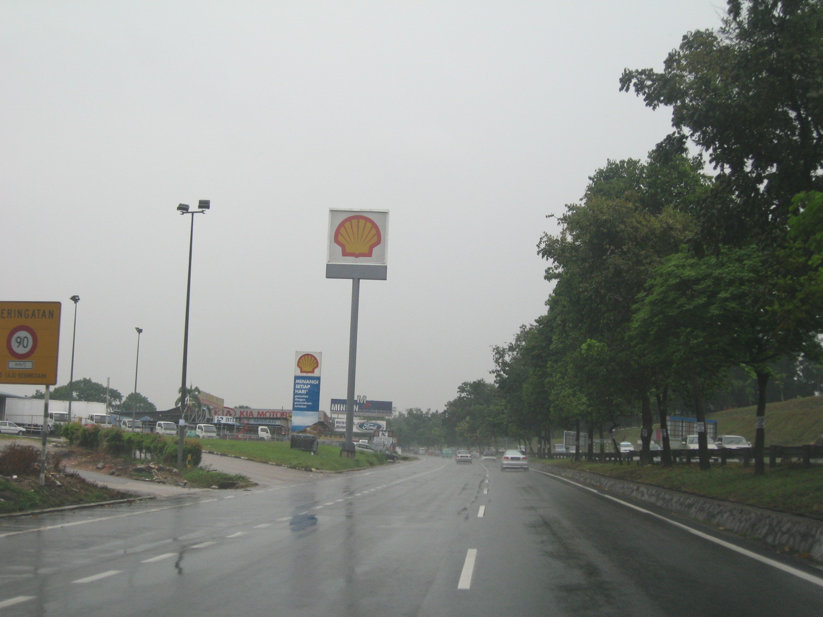 Pasir Gudang Highway, Johor, Malaysia.